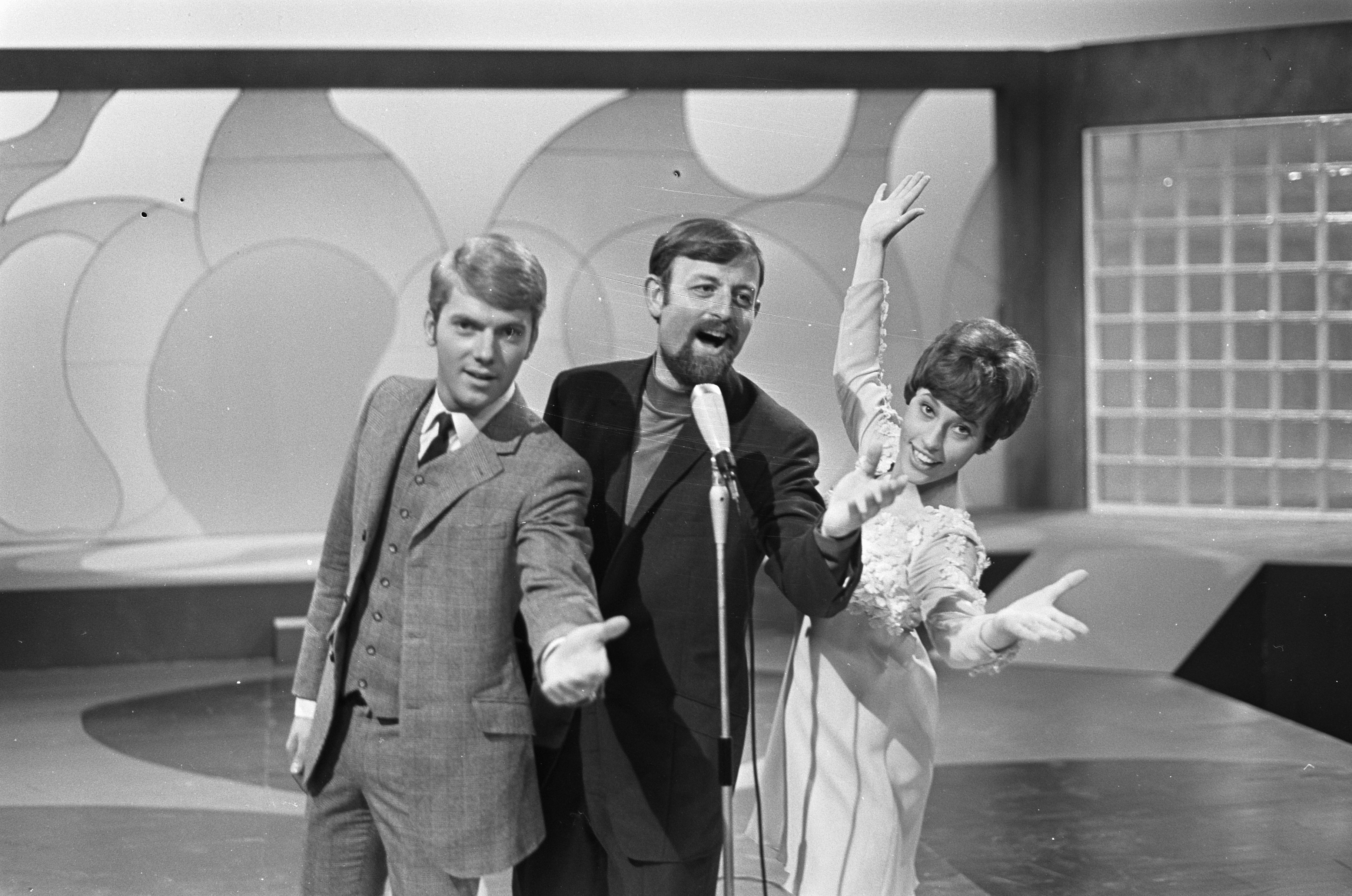 Collectie / Archief : Fotocollectie Anefo Reportage / Serie : TV-show "Trio" Beschrijving : Ronnie Tober, Roger Whittaker, en de Belgische zangeres Tonia (vlnr) zingen Annotatie : Tonia, pseudoniem van Arlette Antonia Dominicus, Deelneemster Eurovisiesongfestival 1966 Datum : 11 september 1968 Trefwoorden : amusementsprogramma's, zangers Persoonsnaam : Tober, Ronnie, Tonia, Whittaker, Roger Fotograaf : Jack de Nijs / Anefo Auteursrechthebbende : Nationaal Archief Materiaalsoort : Negatief (zwart/wit) Nummer archiefinventaris : bekijk toegang 2.24.01.05 Bestanddeelnummer : 921-6691 Reacties Geplaatst door Maaike op 11 januari 2013 - 02:32. Persoonsnamen: Tonia Dominicus Geplaatst door Amusement shows op 08 december 2017 - 14:55. AVRO Televisie. TV-show "Trio". Uitgezonden op 24 september 1968